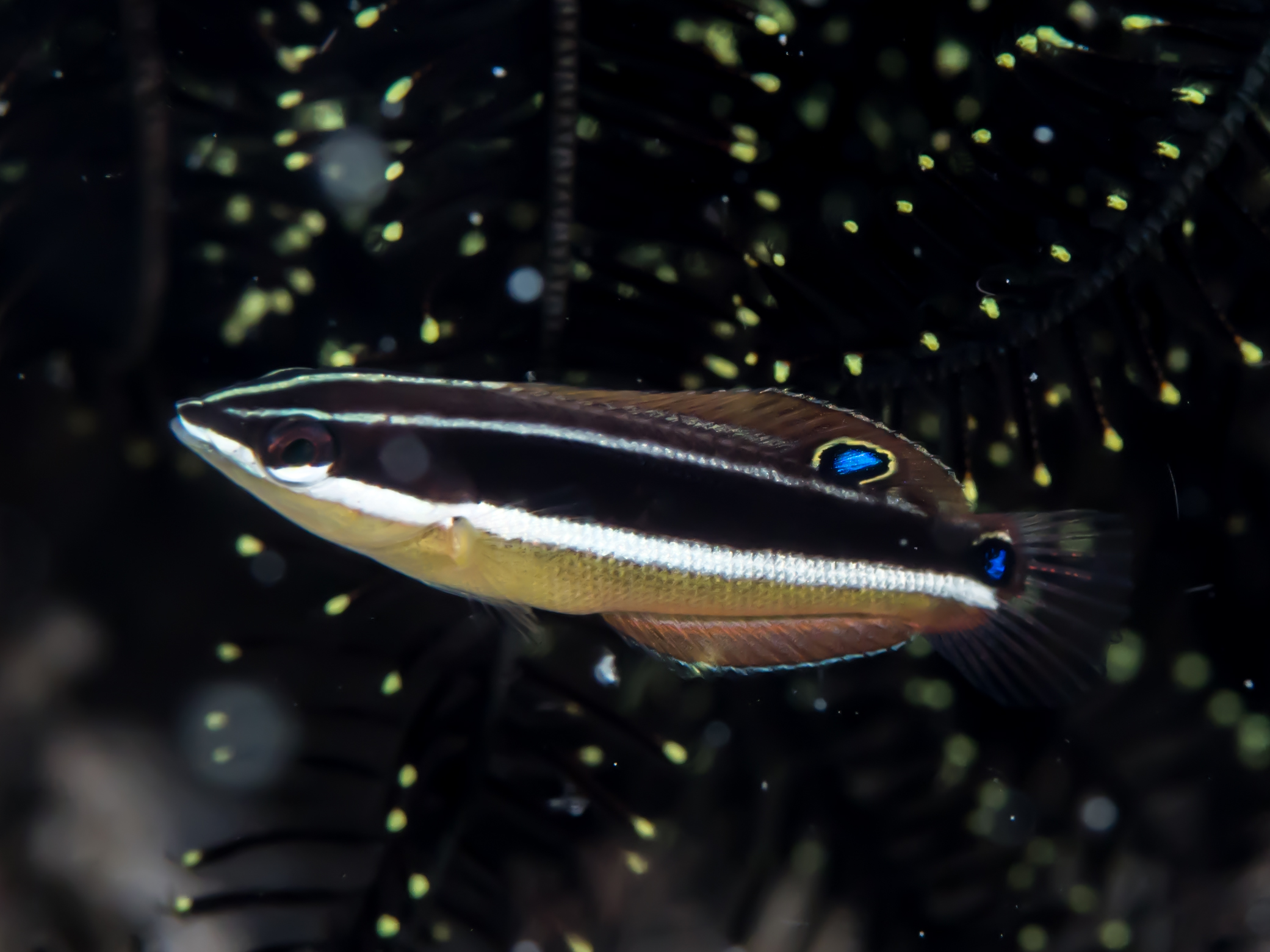 Romblon, Philippines - Pixie coris juvenile (Coris pictoides)